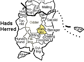 Kort der viser Randlev Sogn, Hads Herred, Århus Amt, Denmark.